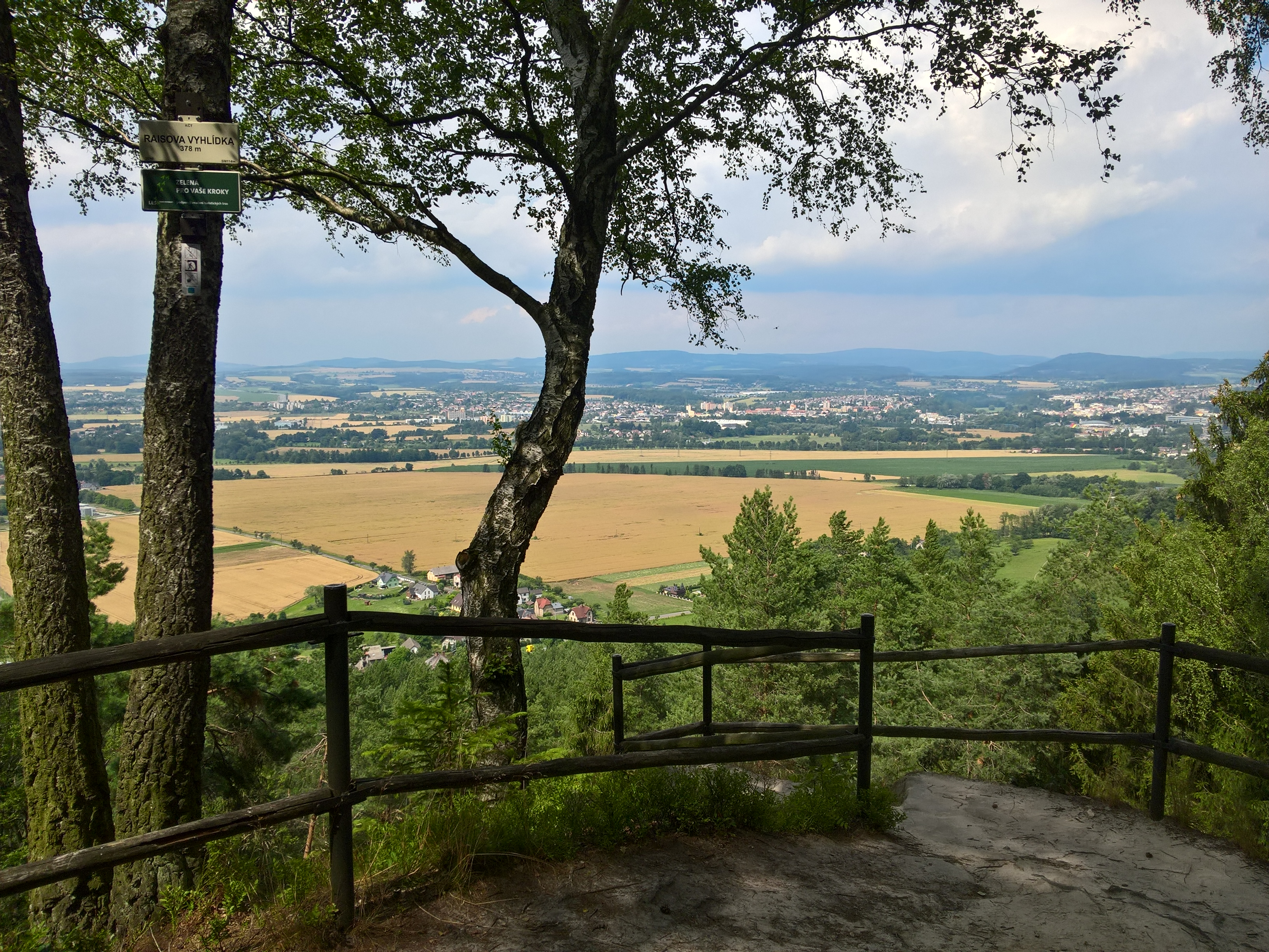 Podle na vyhlídku.